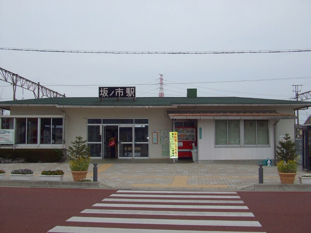 坂ノ市駅舎（2009年3月28日）